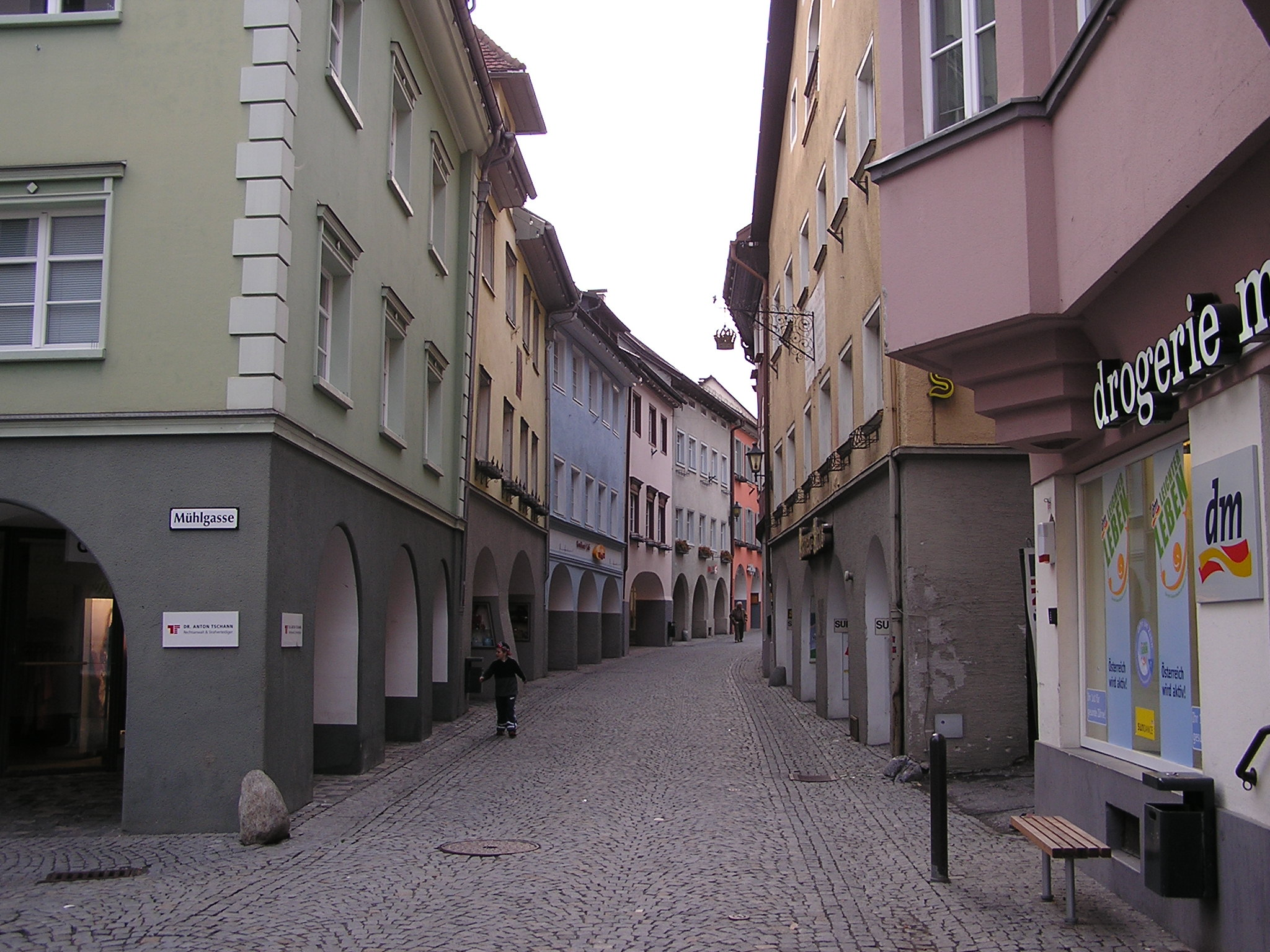 Bludenz Werdenbergerstrasse Ort & Datum: 2006